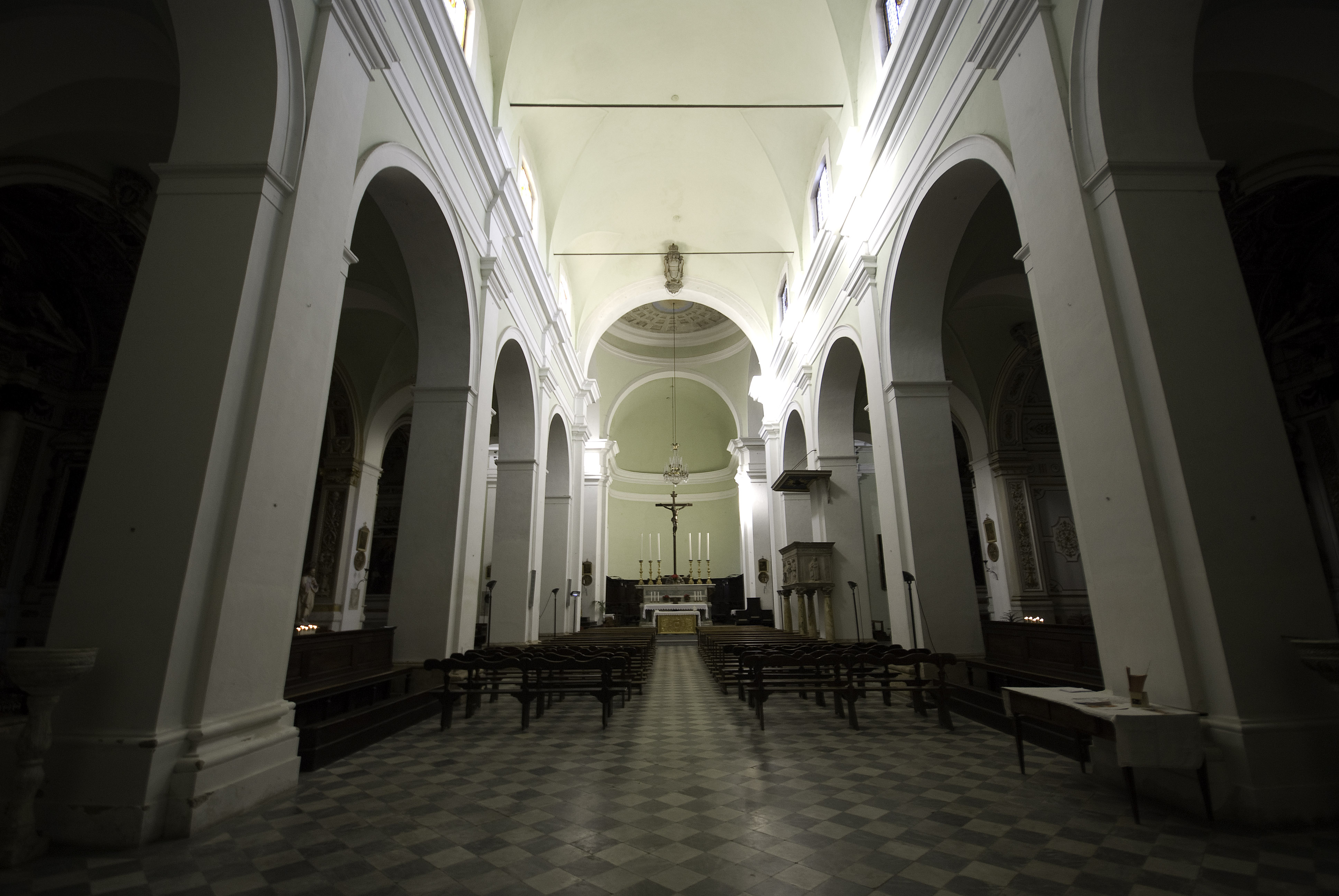 Navata centrale del duomo di colle Val d'Elsa